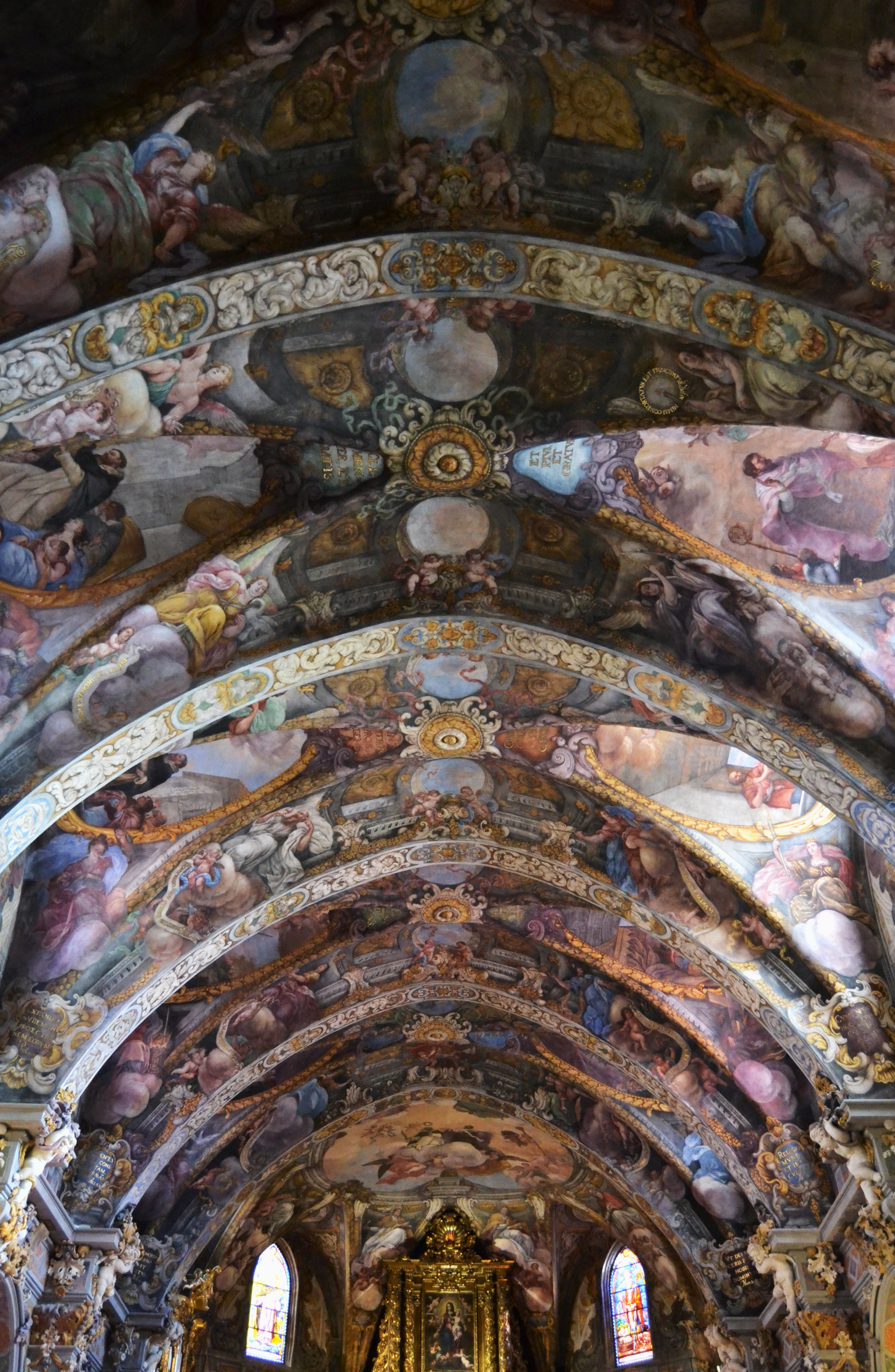 Església de sant Nicolau de València, voltes amb frescos.